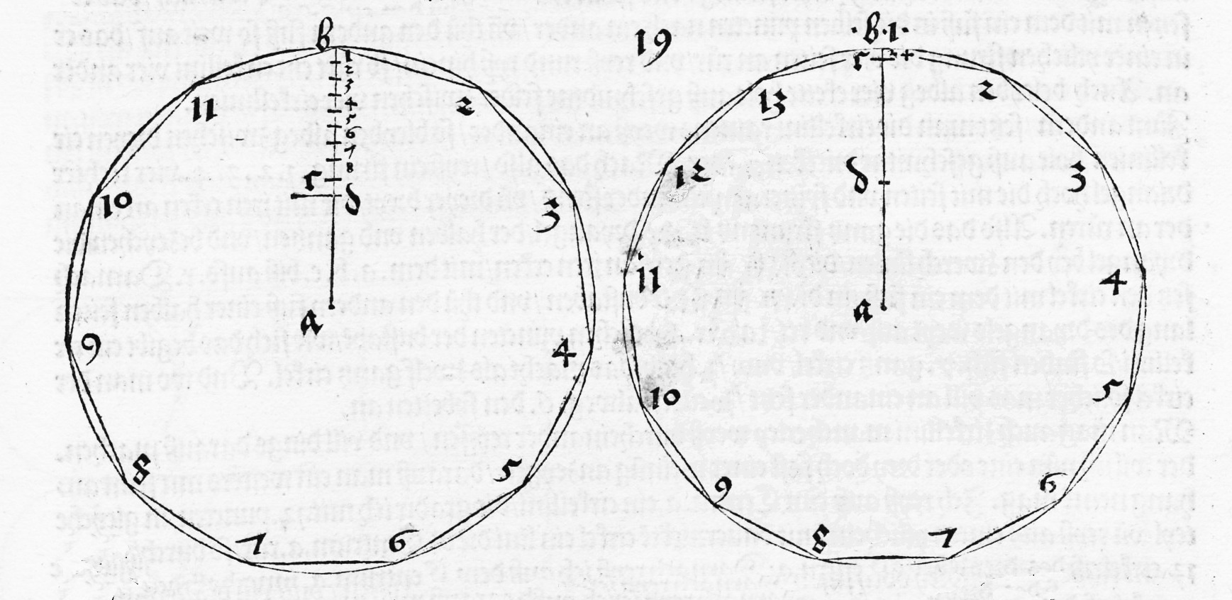 Abbildungs aus Underweysung der Messung, mit dem Zirckel und Richtscheyt, in Linien, Ebenen unnd gantzen corporen